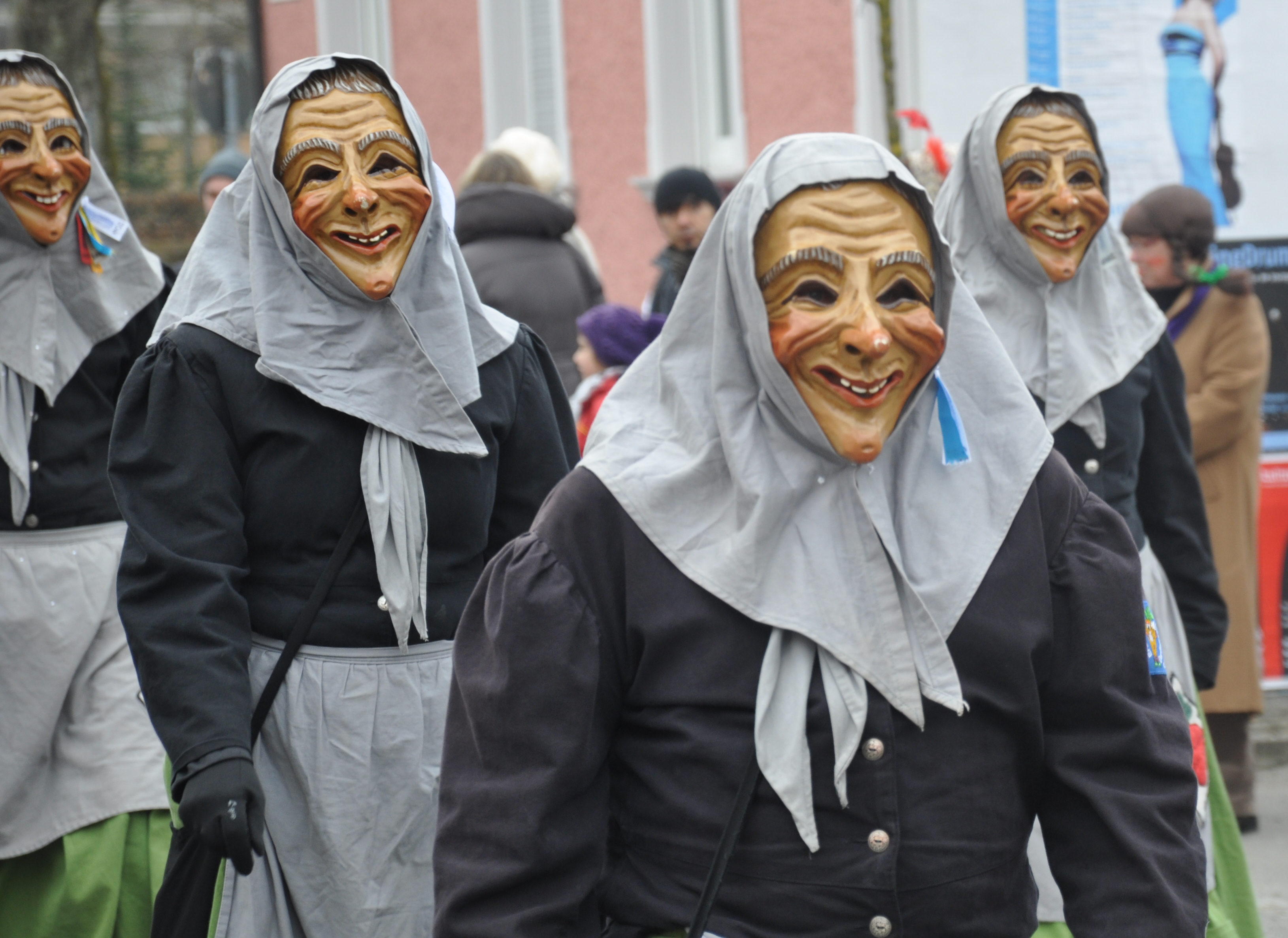 Weingarten (Württemberg), Narrensprung am Fasnetssonntag 2011 Erbisreuter Dorfnarren (Schlier), Narrenfigur „Riabaweible“ (vorne eine Runkelrübe)